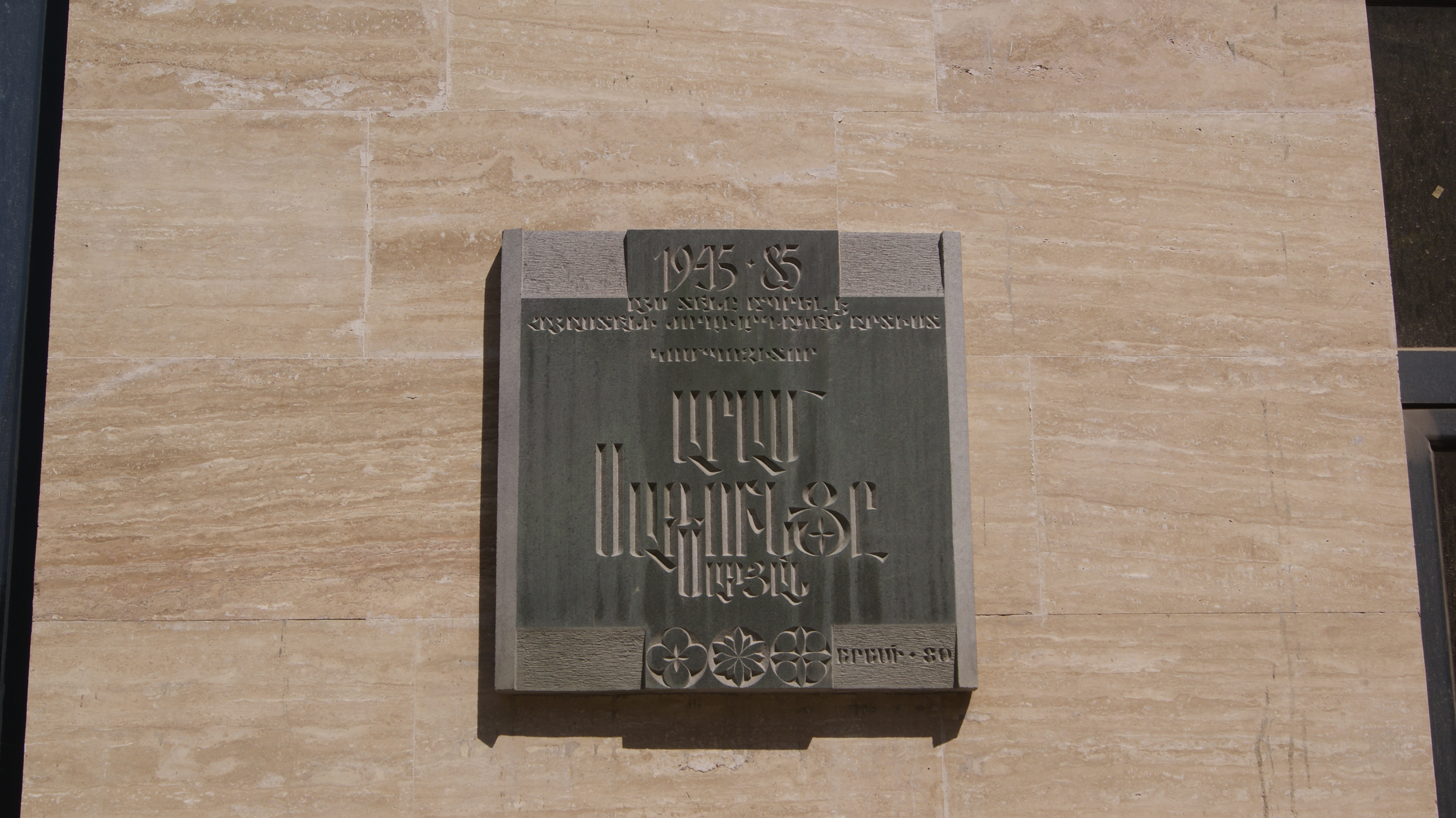 Բնակելի տուն Մկրտիչ Մկրտչյանցի 6/206.1